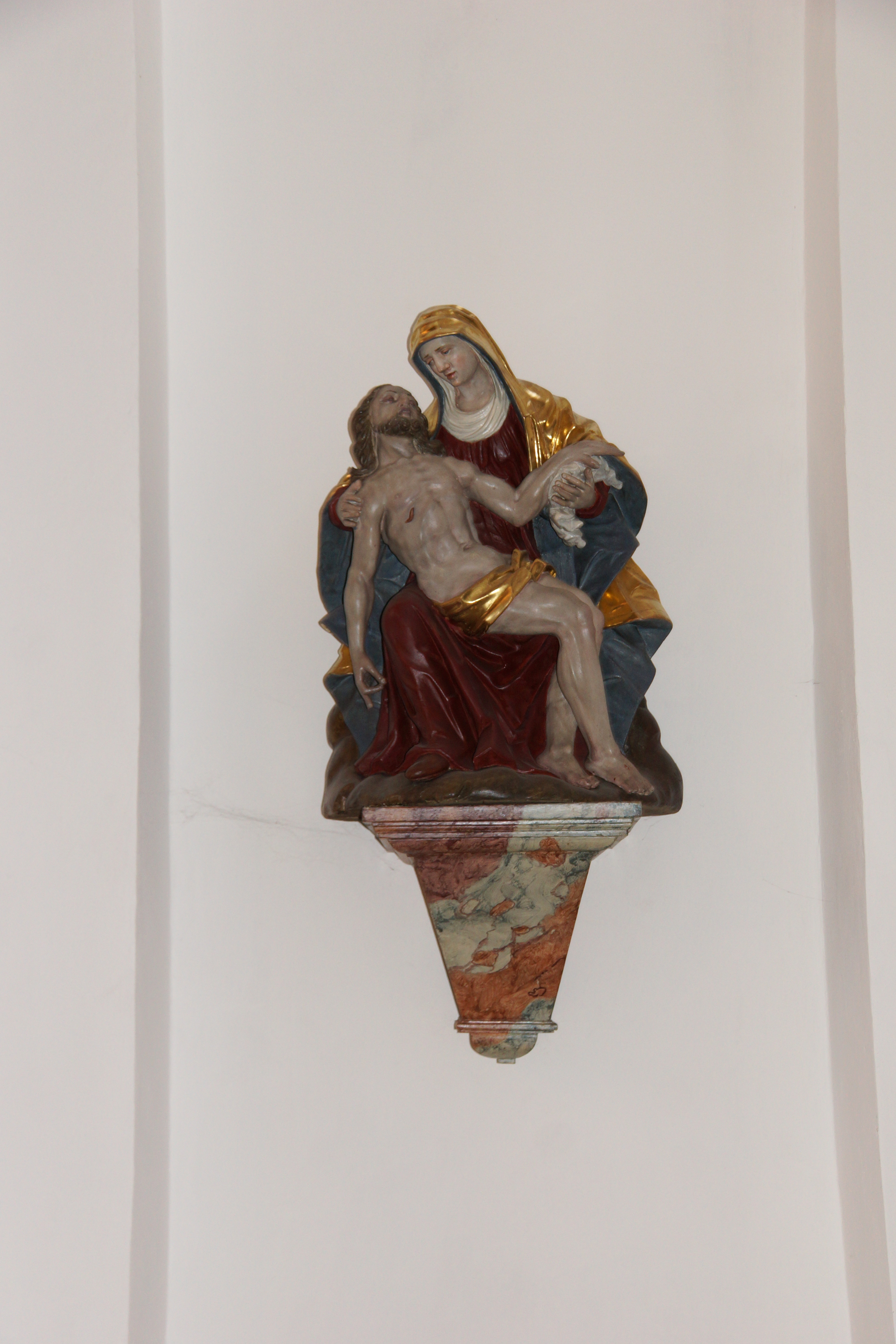 Die katholische Pfarrkirche St. Ägidius in Vilseck in der Oberpfalz